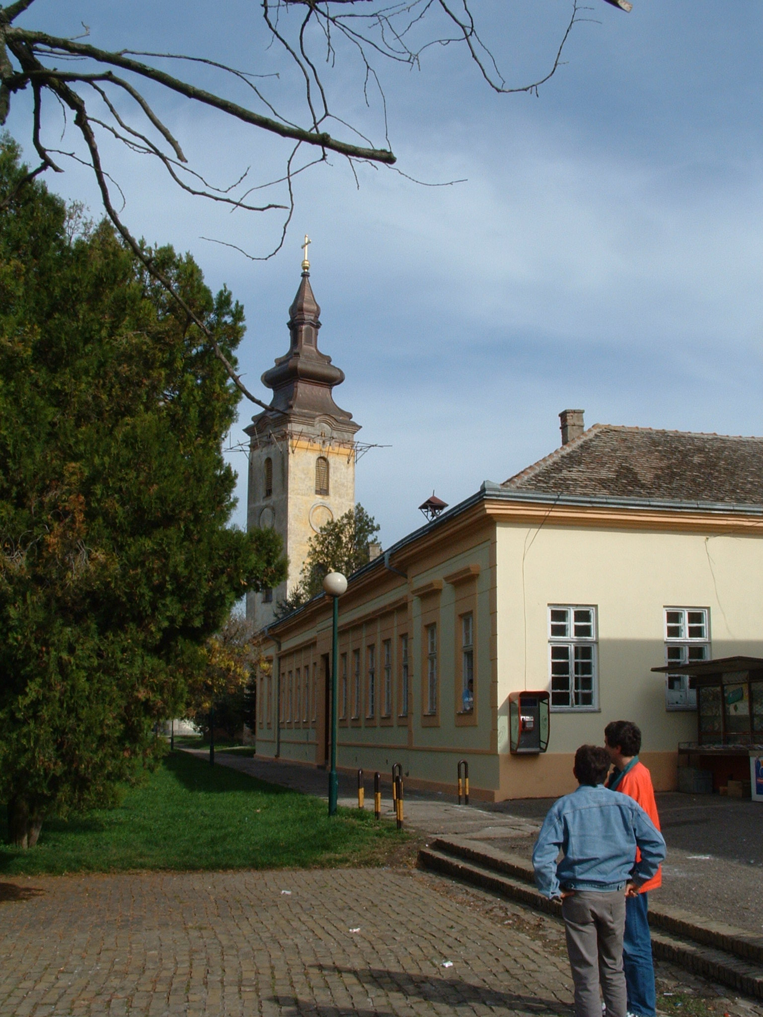 Domy v centrální části vesnice Šašinci, Srbsko